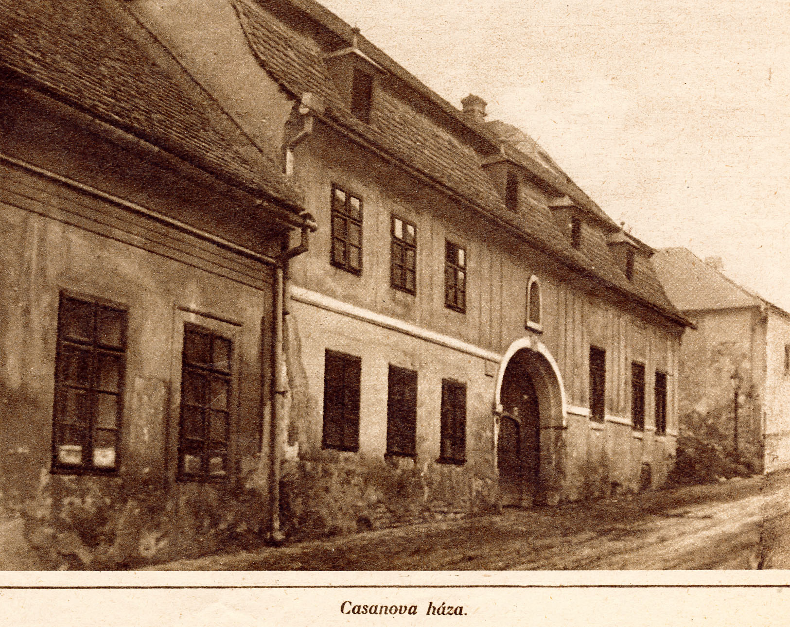 Budapest, Tabán, a Casanova háza.